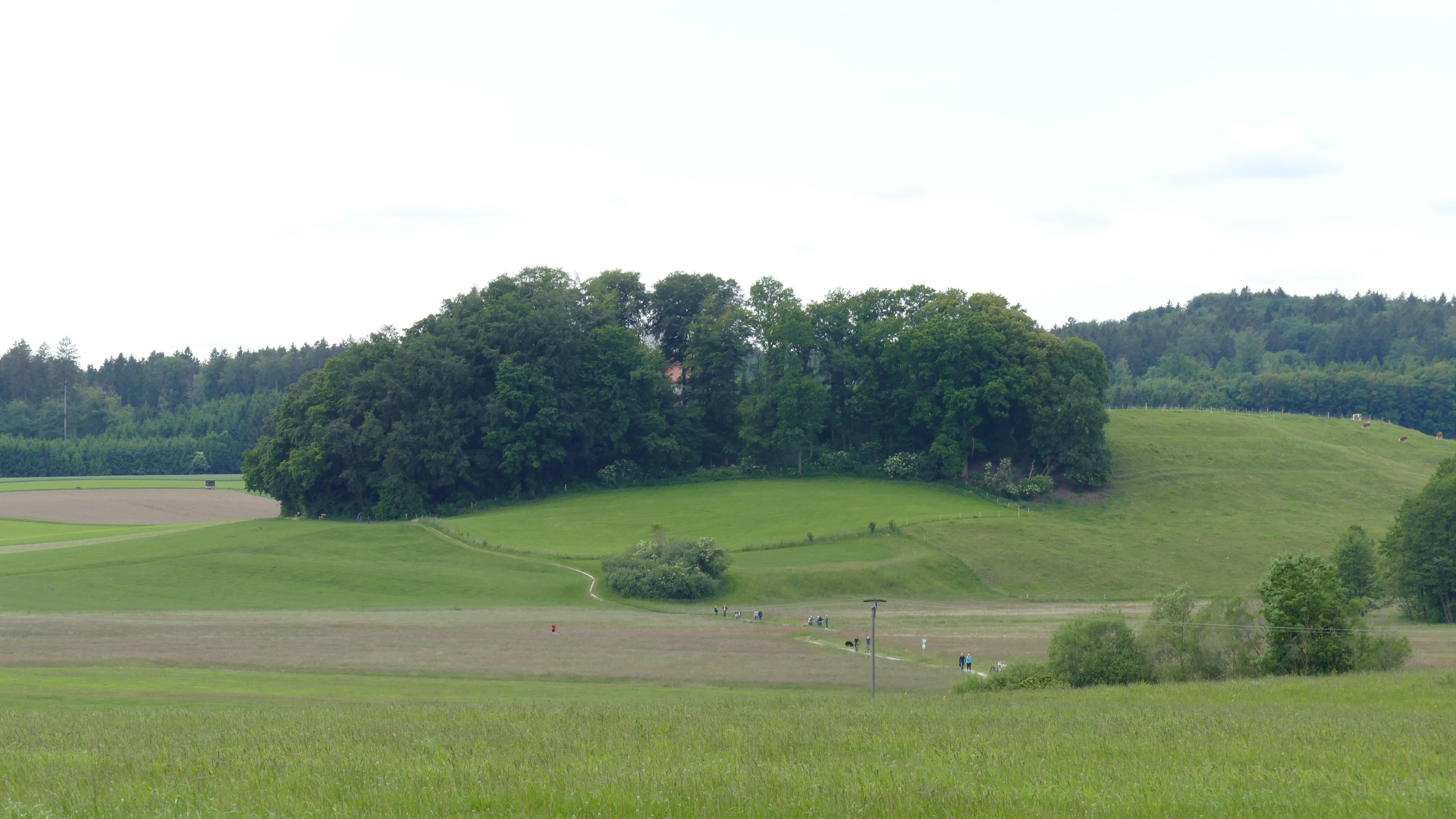 Geotop 175R006 - Egglburger Os W von Ebersberg, Landkreis Ebersberg